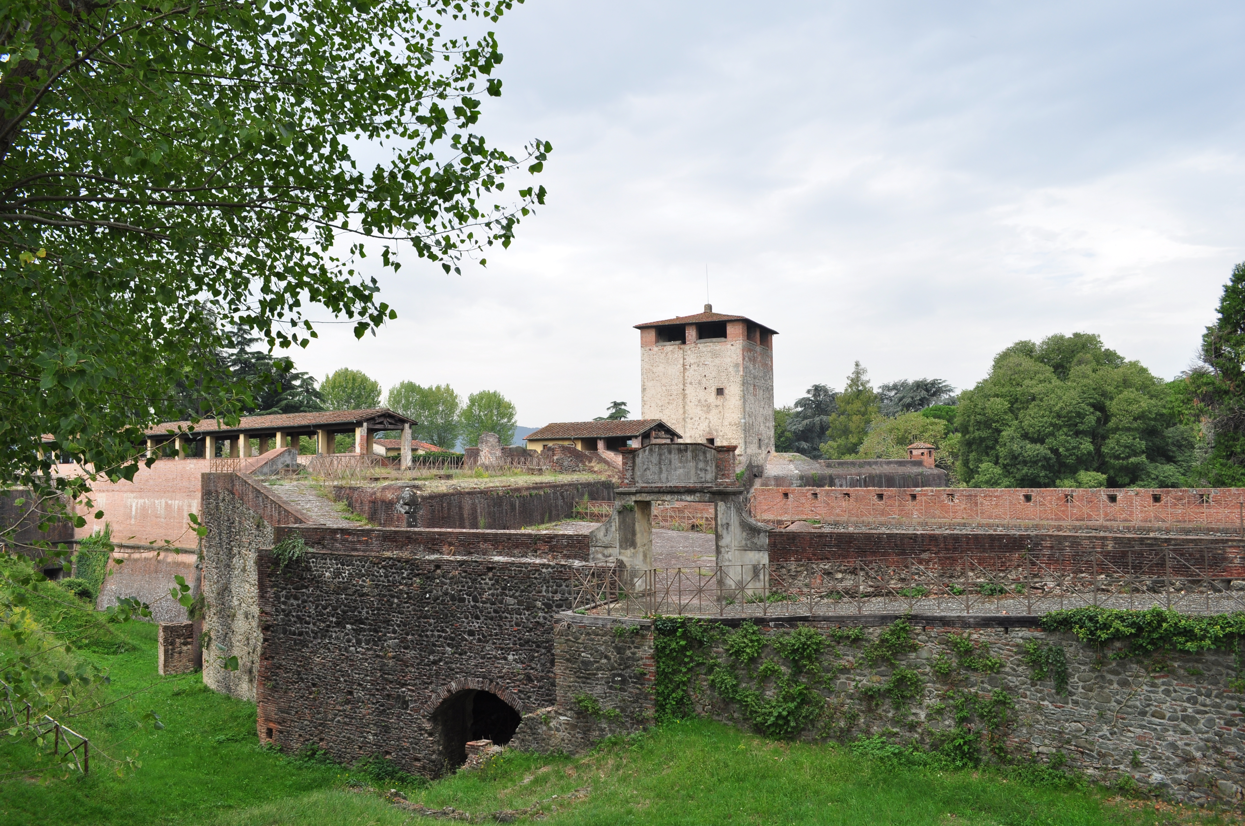 Fortezza di Santa Barbara - MIBAC This is a photo of a monument which is part of cultural heritage of Italy.